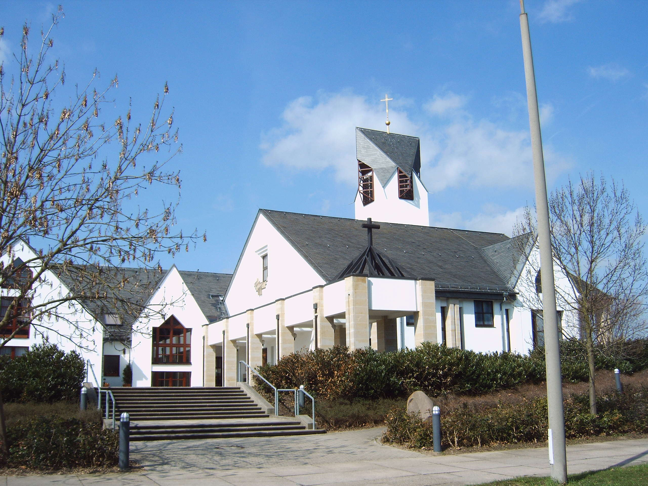 St.-Josef-Kirche in Magdeburg, Deutschland.